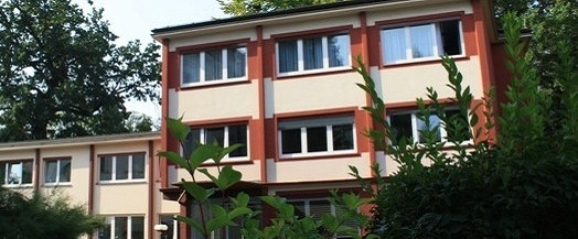 Gebäude Institut für Systemwissenschaften, Innovations- und Nachhaltigkeitsforschung